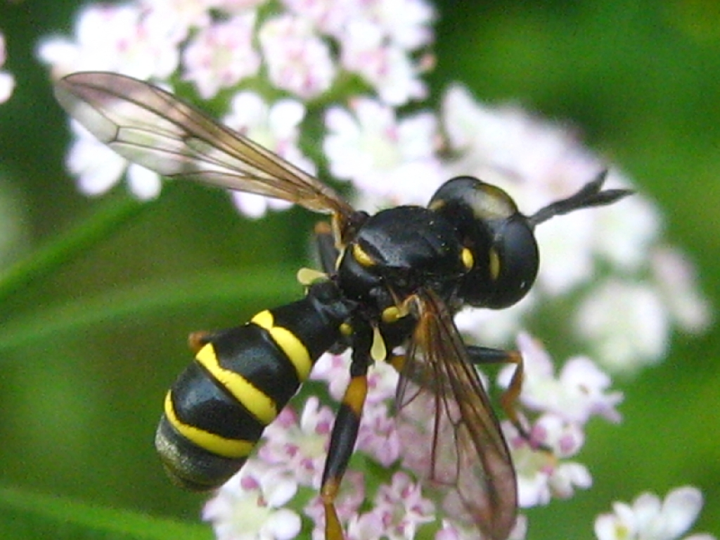 Conops flavipes